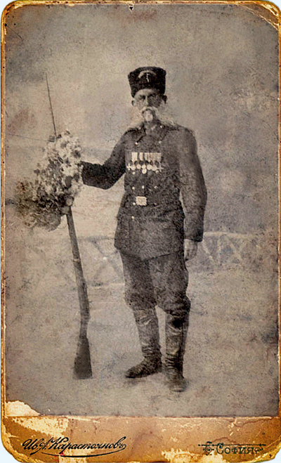 Никола Корчев